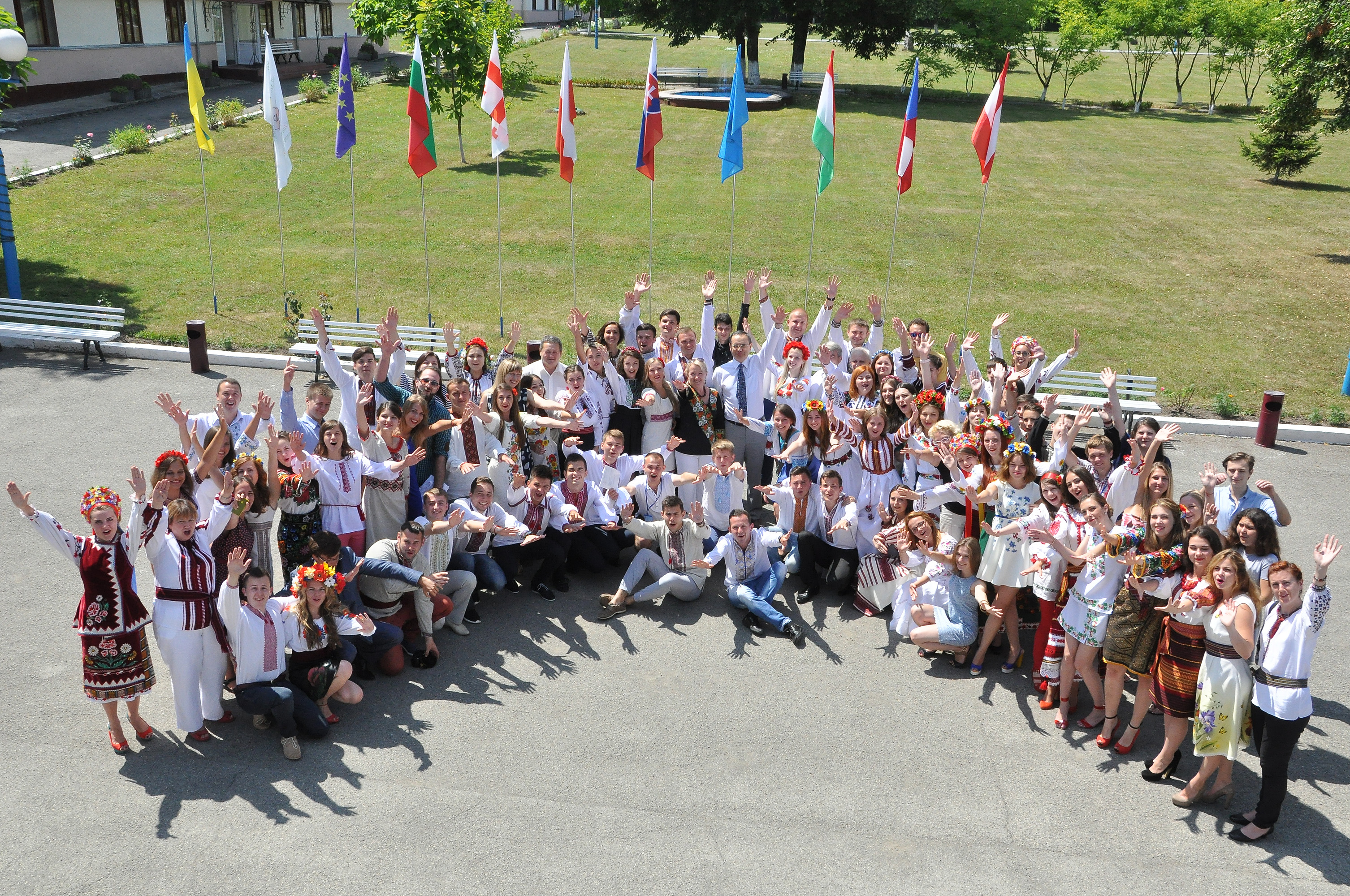 X Літні міжнародні студентські школи в НОК «Червона калина» Тернопільського державного медичного університету імені І. Я. Горбачевського.